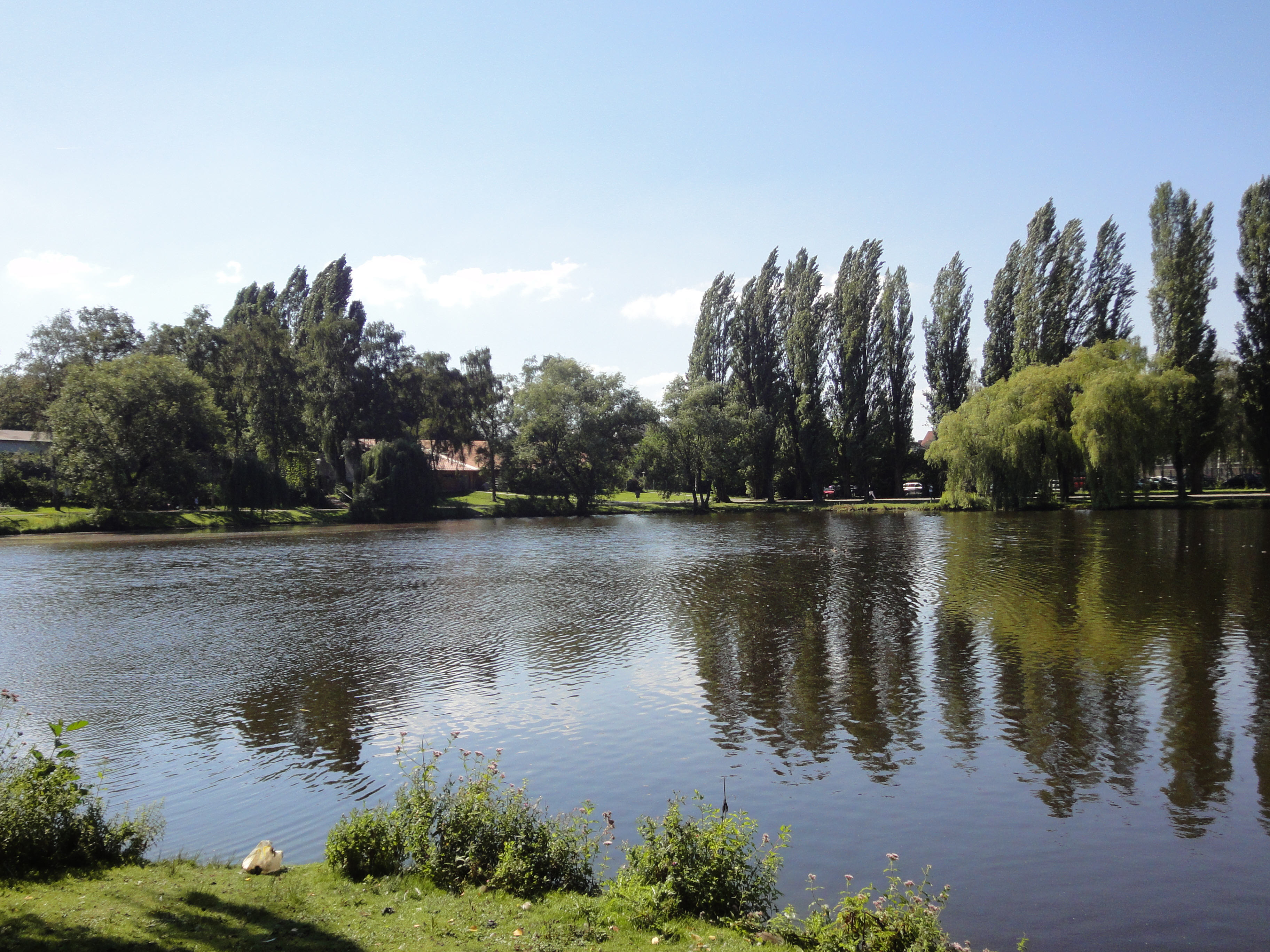 Friedrich-Ebert-Park